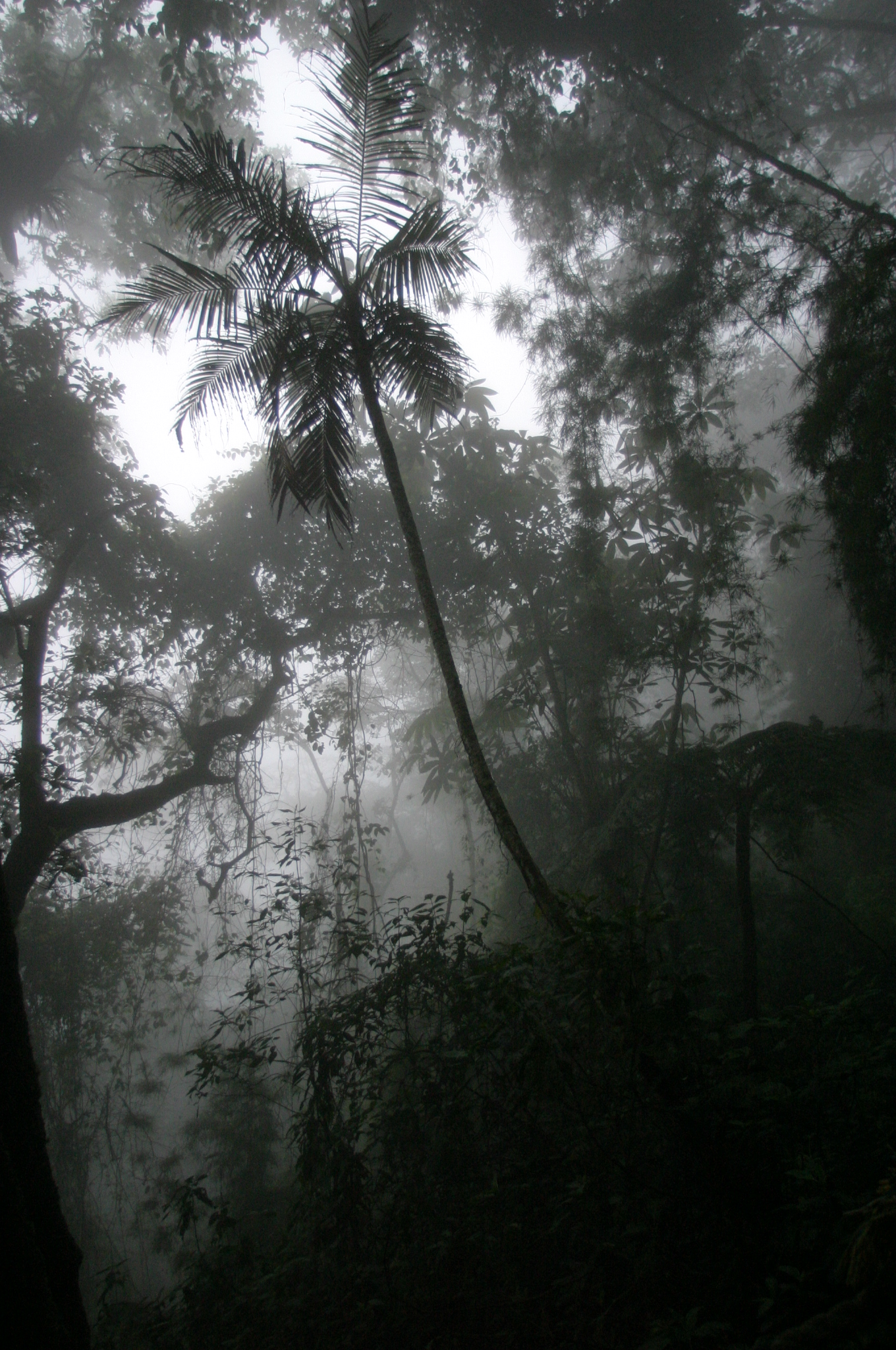 El bosque de niebla del parque Chicaque, a las afueras de Bogotá en Colombia